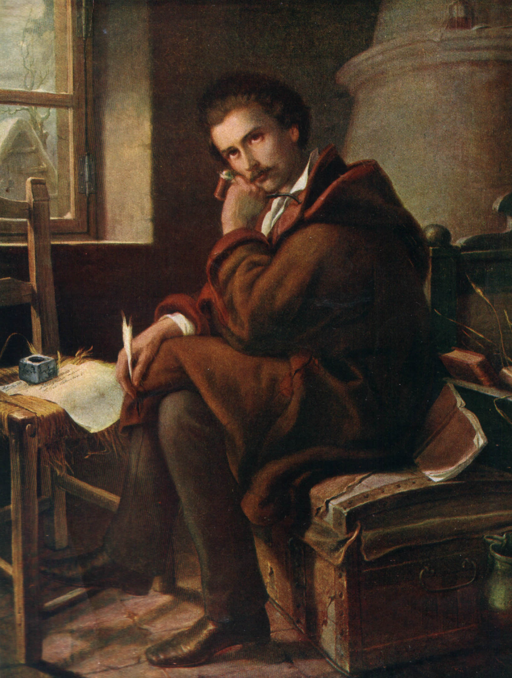 Petőfi Sándor Debrecenben, 1844. Orlay Petrich Soma festménye.